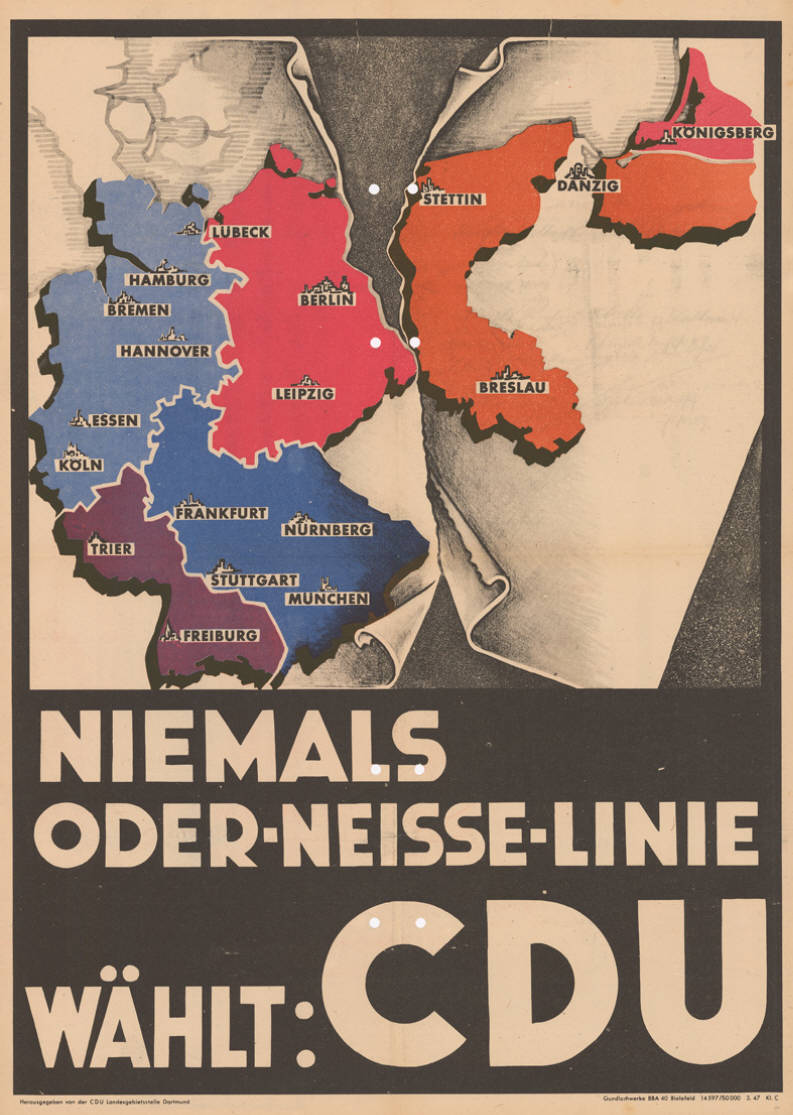 Niemals Oder-Neisse-Linie Wählt: CDU Abbildung: Geteiltes Deutschland (Besatzungszonen/Grafik) Kommentar: Vgl. Landtagswahlplakat Schleswig-Holstein Nr. 10-012-5 Plakatart: Motiv-/Textplakat Auftraggeber: CDU Landesgebietsstelle Dortmund Drucker_Druckart_Druckort: Gundlachwerke BBA 40 Bielefeld 14726/50000 4.47 Kl. C Objekt-Signatur: 10-009 : 21 Bestand: Landtagswahlplakate Nordrhein-Westfalen (10-009) GliederungBestand10-18: Landtagswahlplakate Nordrhein-Westfalen (10-009) » Landtagswahl am 20.4.1947 » Motivplakate Lizenz: KAS/ACDP 10-009 : 21 CC-BY-SA 3.0 DE